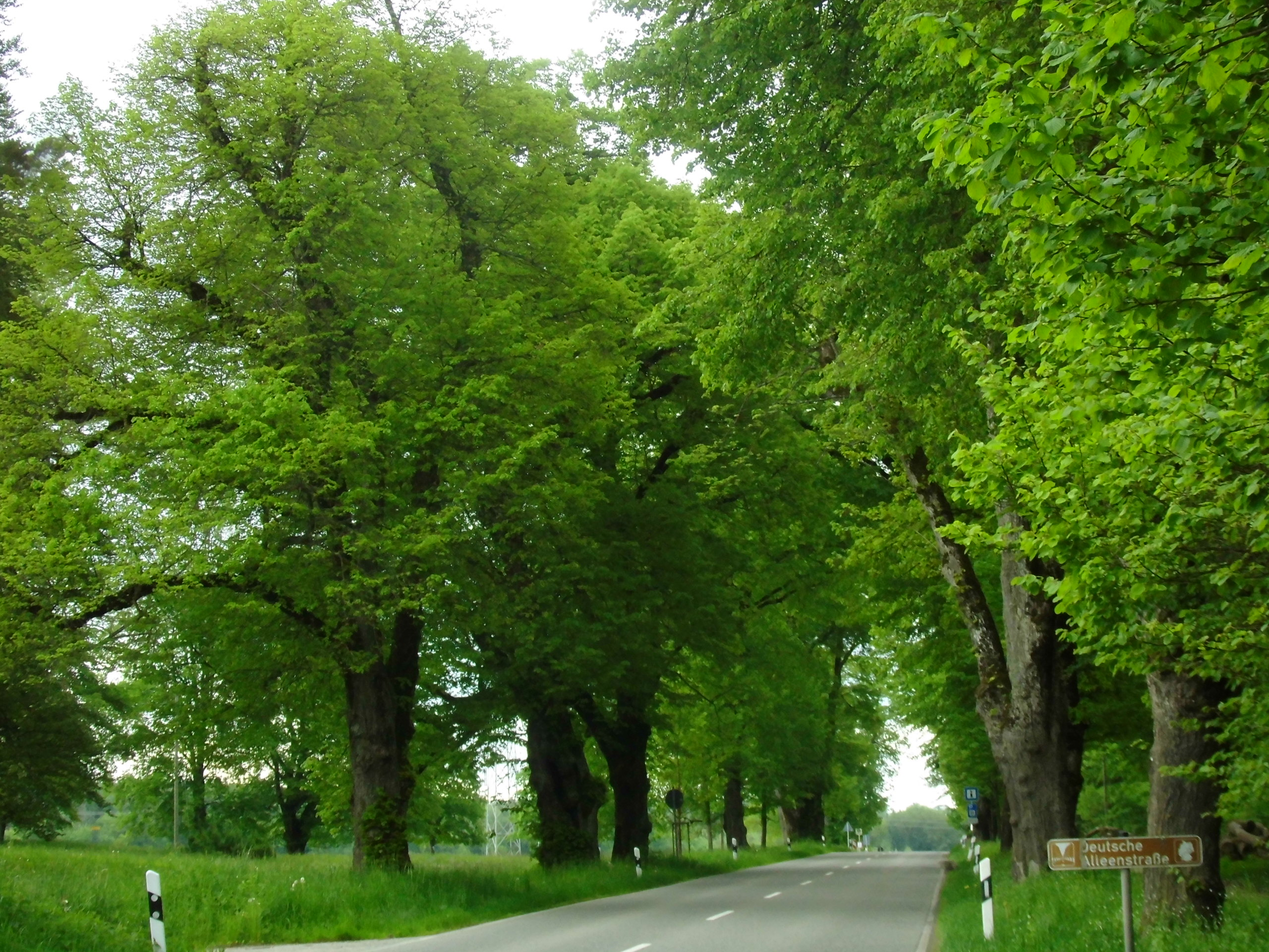 Das Naturdenkmal Lindenallee mit Eschen u. Ahorne (50 Bäume) (Schutzgebiets-Nr. 84150190213) liegt zwischen Eningen unter Achalm und St. Johann (Württemberg) Die Allee im Landschaftsschutzgebiet Reutlinger und Uracher Alb ist auch Teil Deutschen Alleenstraße im Abschnitt 8 zwischen Reutlingen und Gammertingen. Blick vom Westabschnit nach Osten